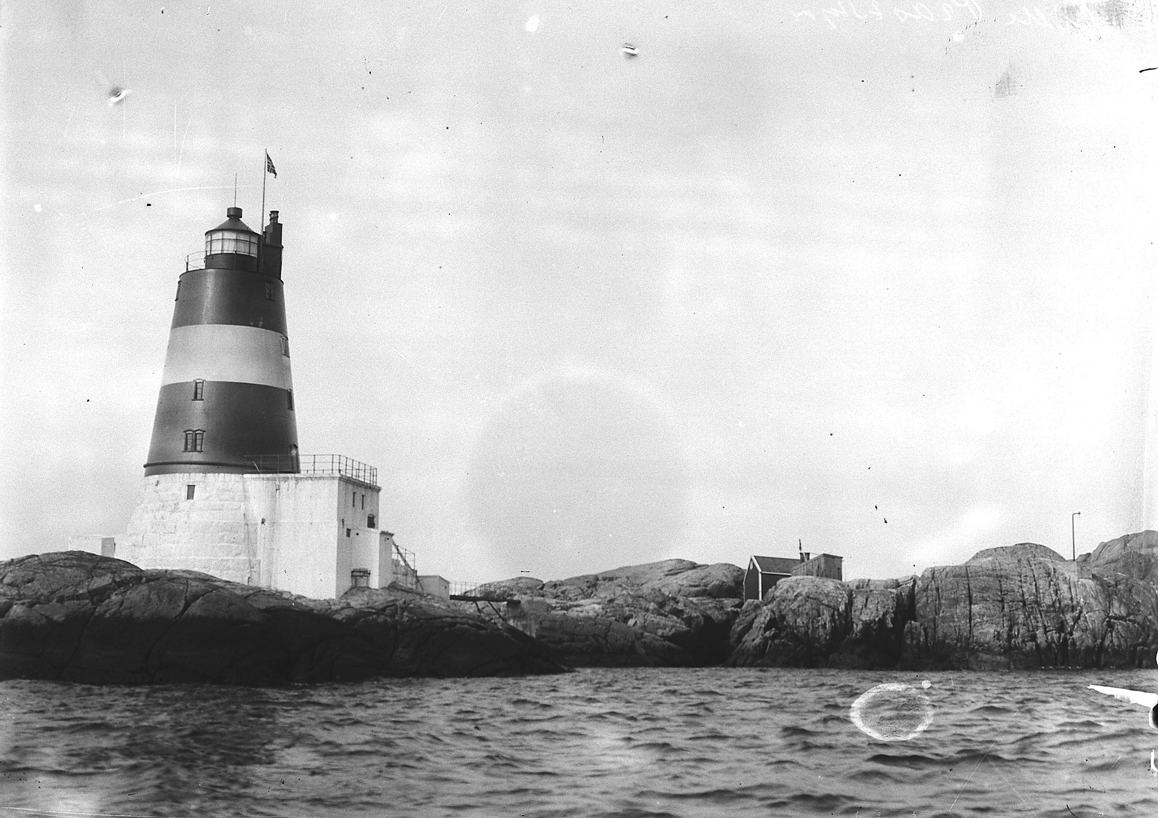 Bildet er hentet fra Arkivverket. Lille Prestskjær, Sokndal Arkivinstitusjon : Riksarkivet Arkivnavn : Fyrdirektoratet Sted : Norge, Rogaland, Sokndal, Lille Prestskjær Emneord: Fyr, Kyst Avbildet